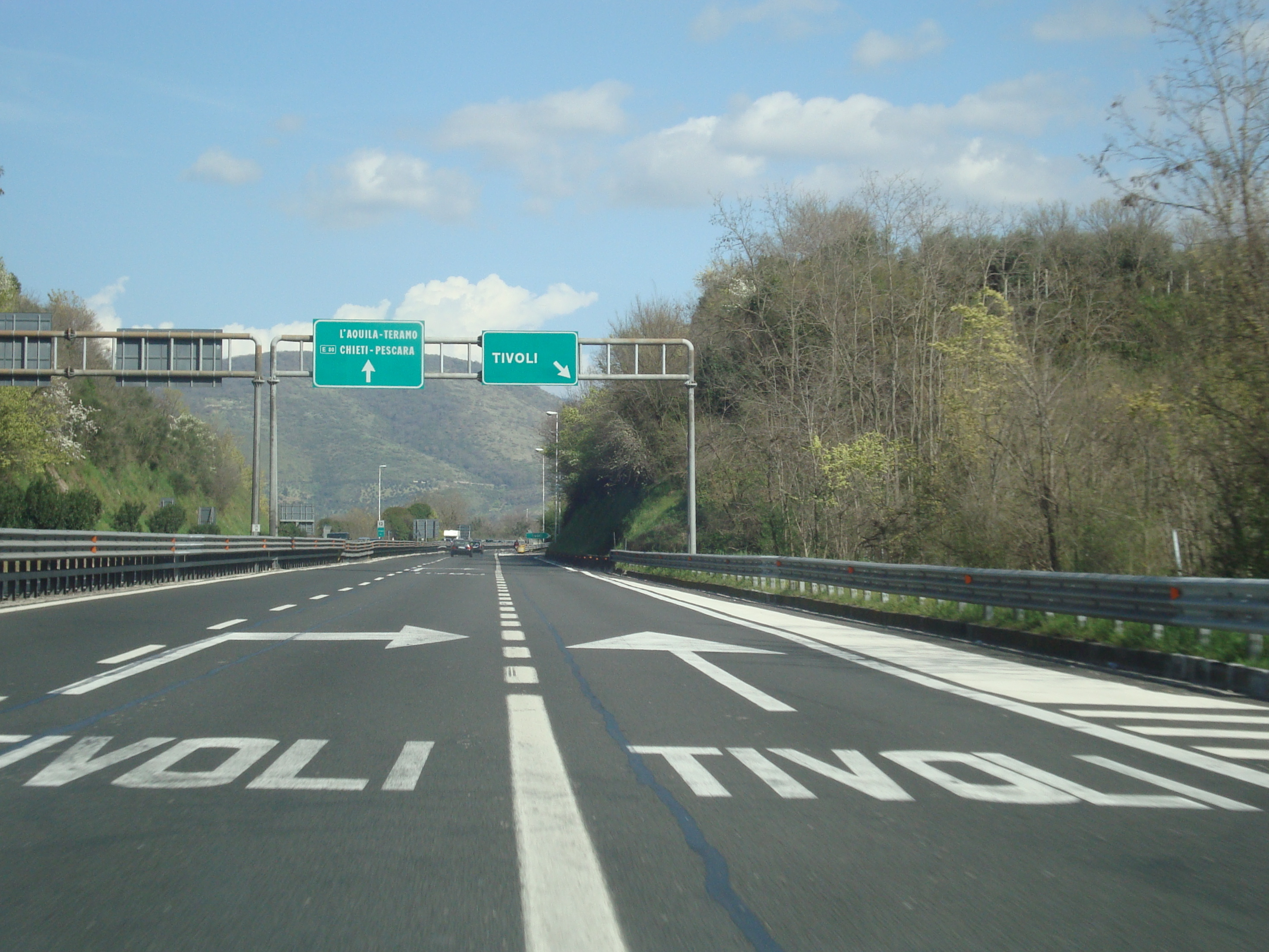 Sortie Tivoli sur l'autoroute italienne A24